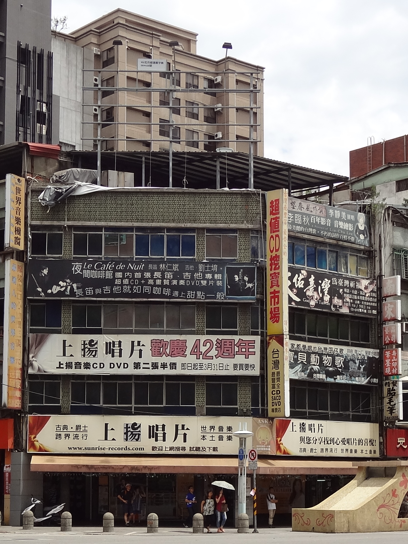 中文（台灣）: 上揚唱片總部，位於臺北市中山區中山北路二段77之4號。